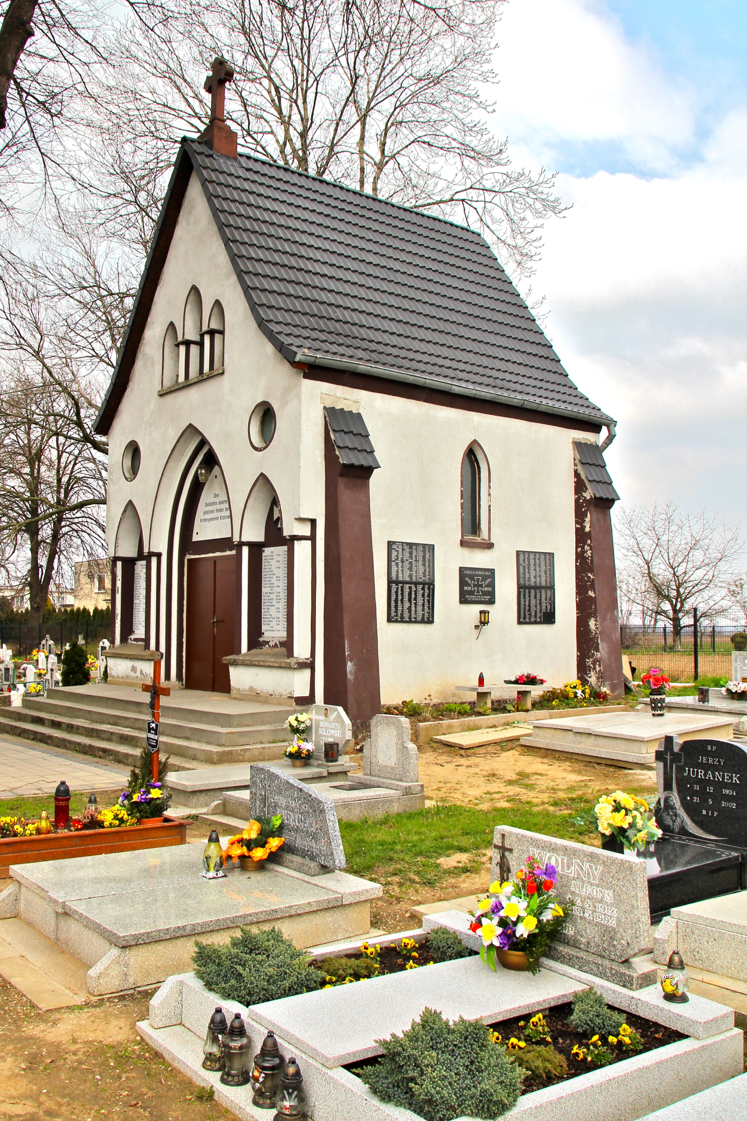 Długomiłowice (dodatkowa nazwa w j. niem. Langlieben) – wieś w Polsce położona w województwie opolskim, w powiecie kędzierzyńsko-kozielskim, w gminie Reńska Wieś.